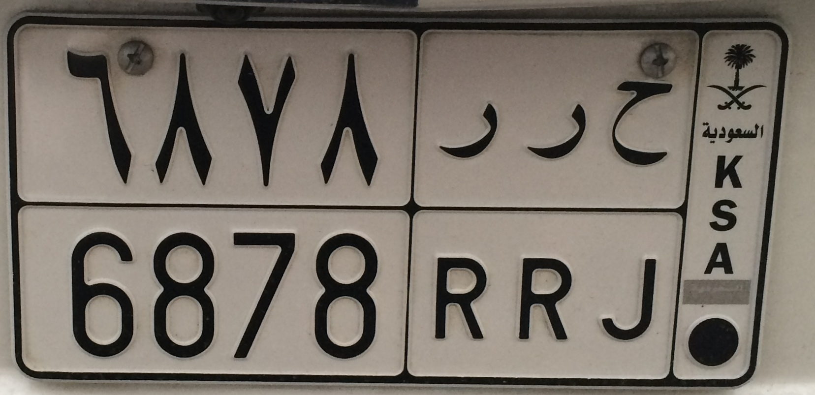 kentekenplaat Saoedi-Arabië